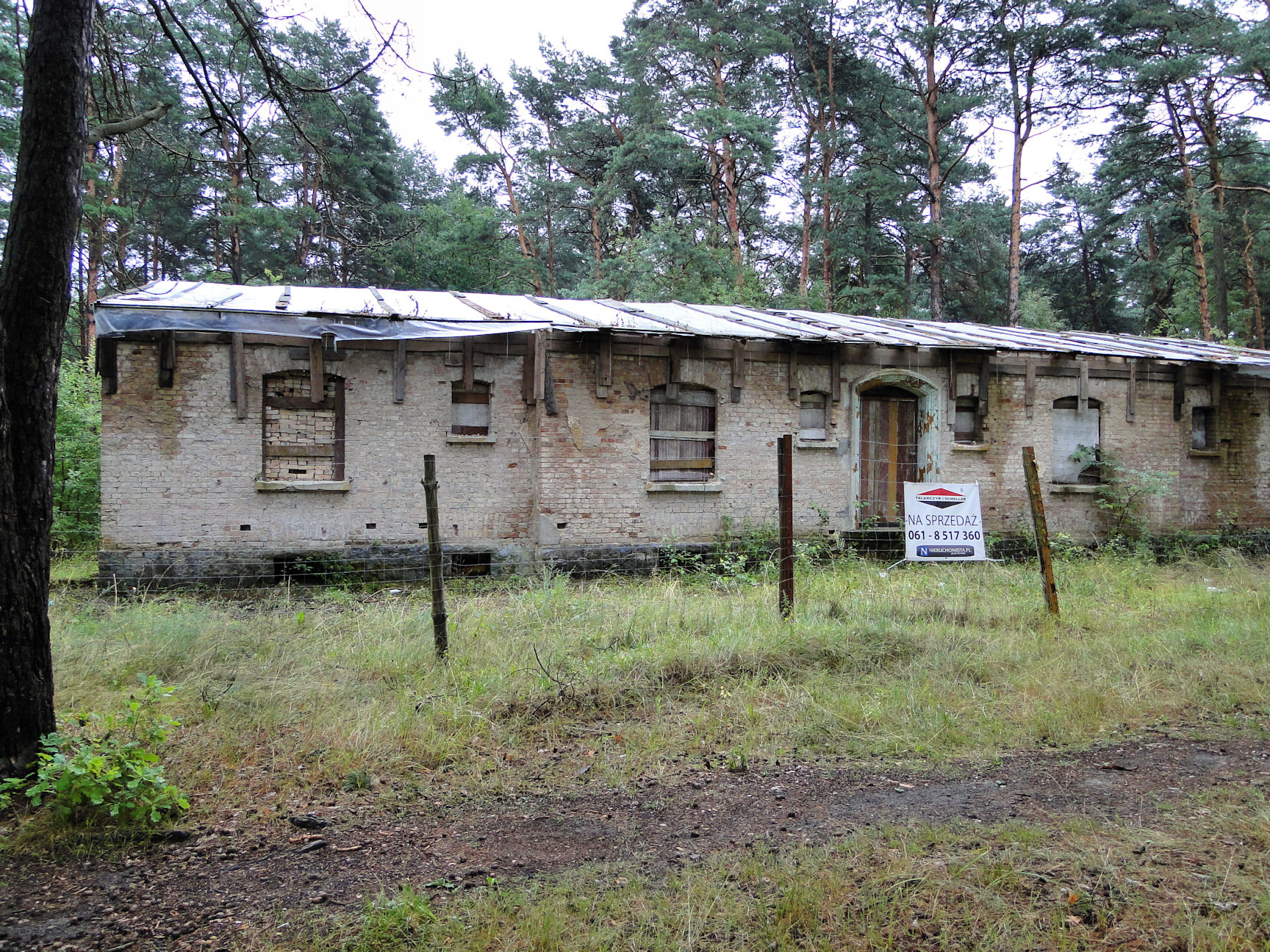 Borne Sulinowo